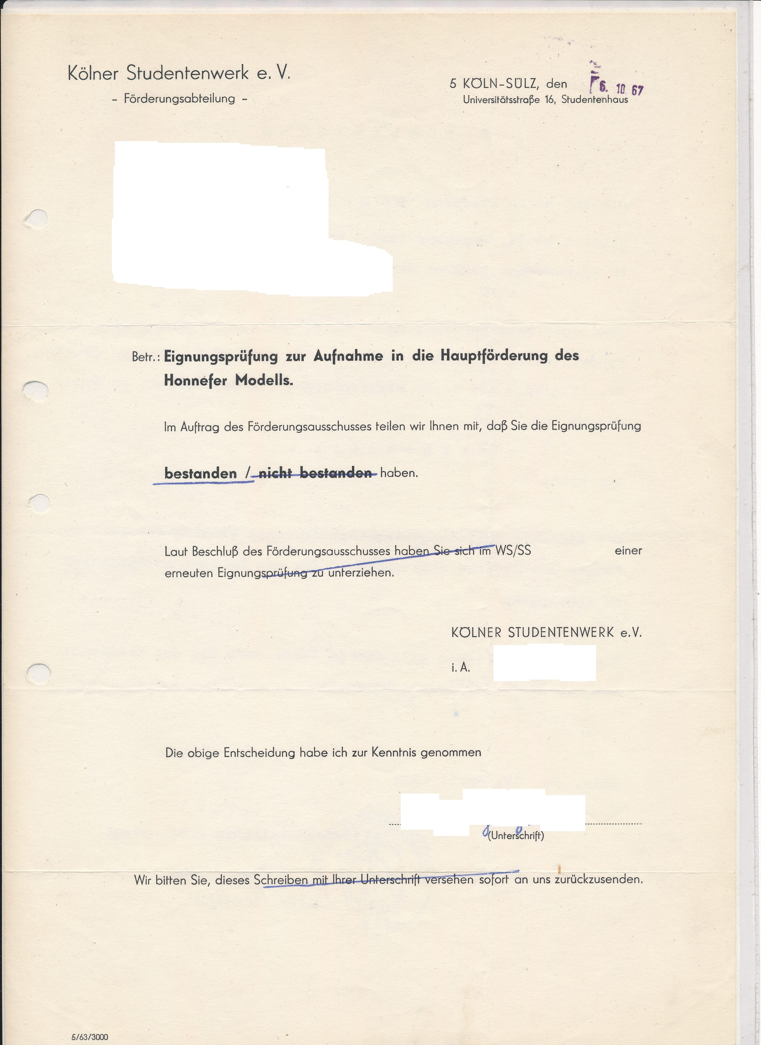 Bescheinigung über die bestandene Eignungsprüfung zur Aufnahme in die Hauptförderung des Honnefer Modells